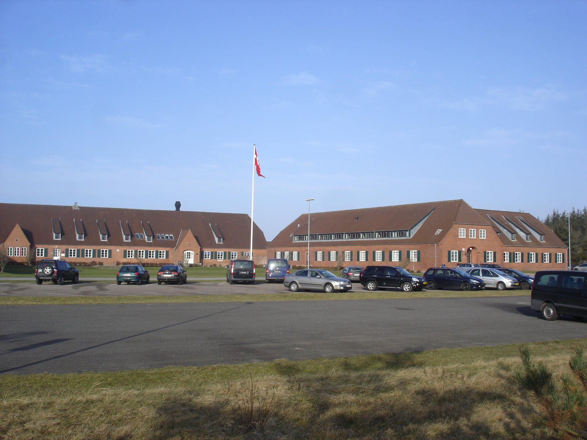 Hjemmeværnsgården i Nymindegab